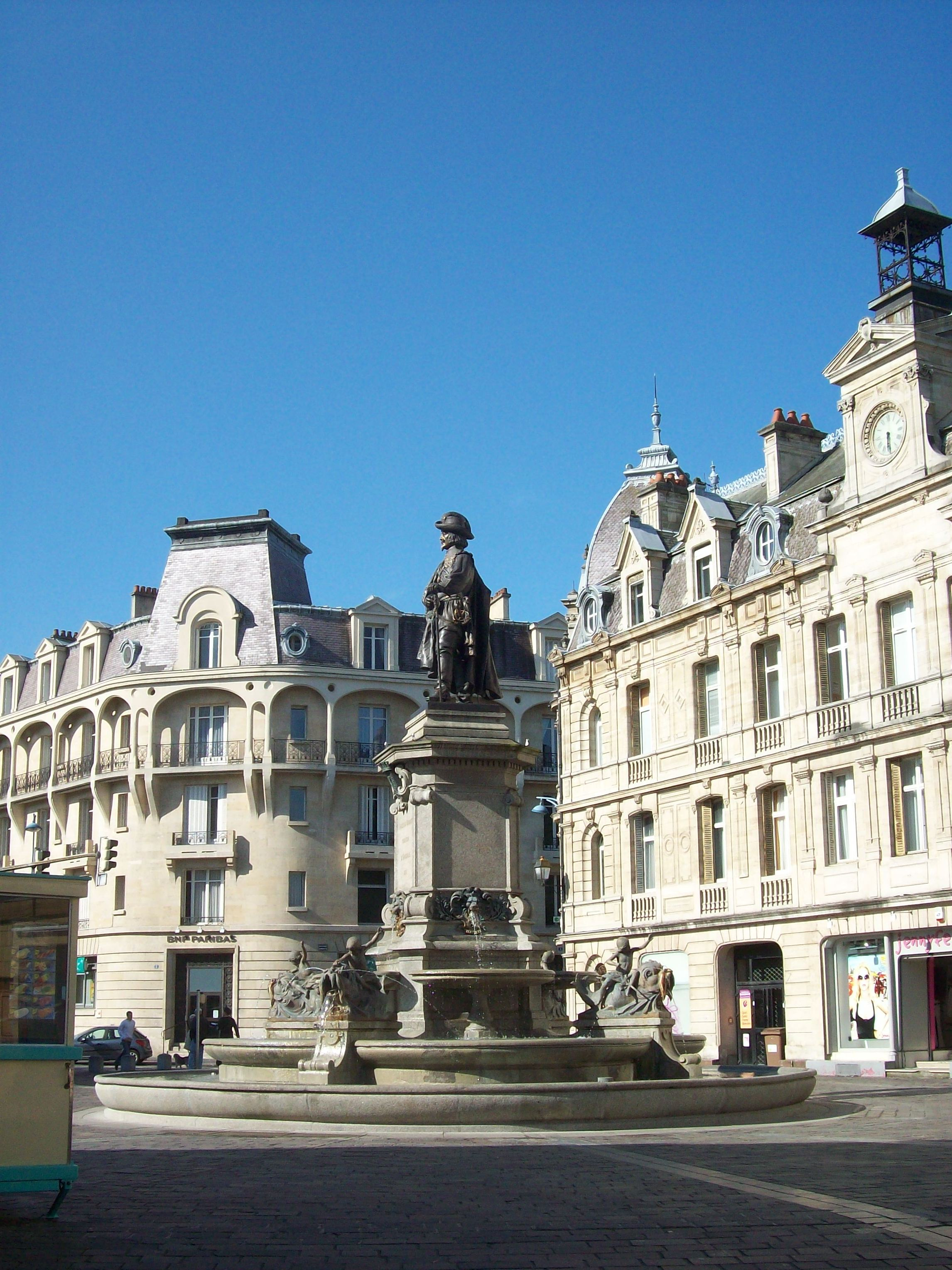 Ville: Charleville-Mézières Région: Champagne-Ardenne Pays: France